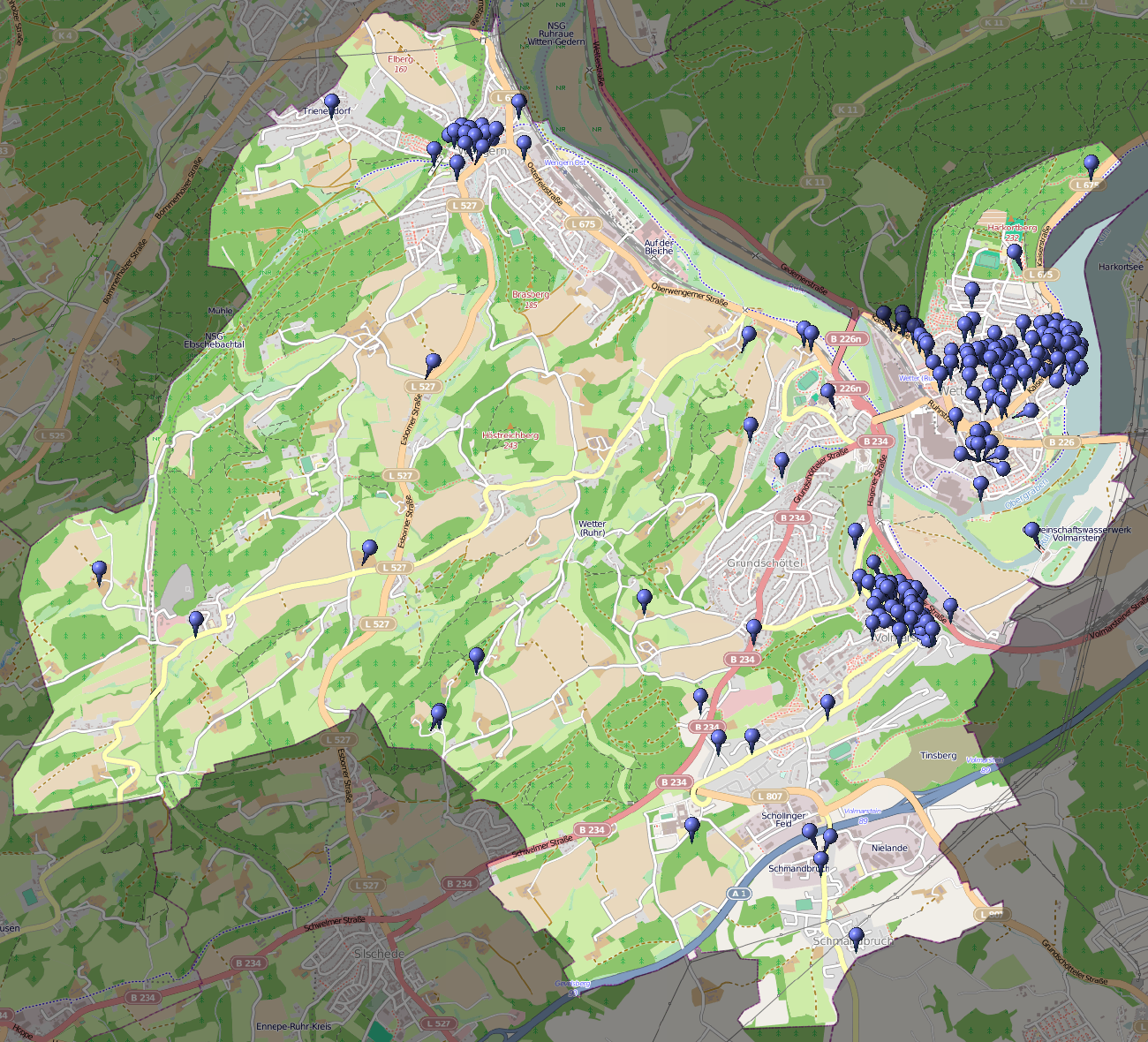 Karte der Lage aller Baudenkmäler in Wetter (Ruhr), Stand Juni 2012; deutlich zu erkennen ist die Denkmalhäufung in den drei Siedlungskernen Alt-Wetter (oben rechts), Volmarstein (mittig rechts) und Wengern (oben links)